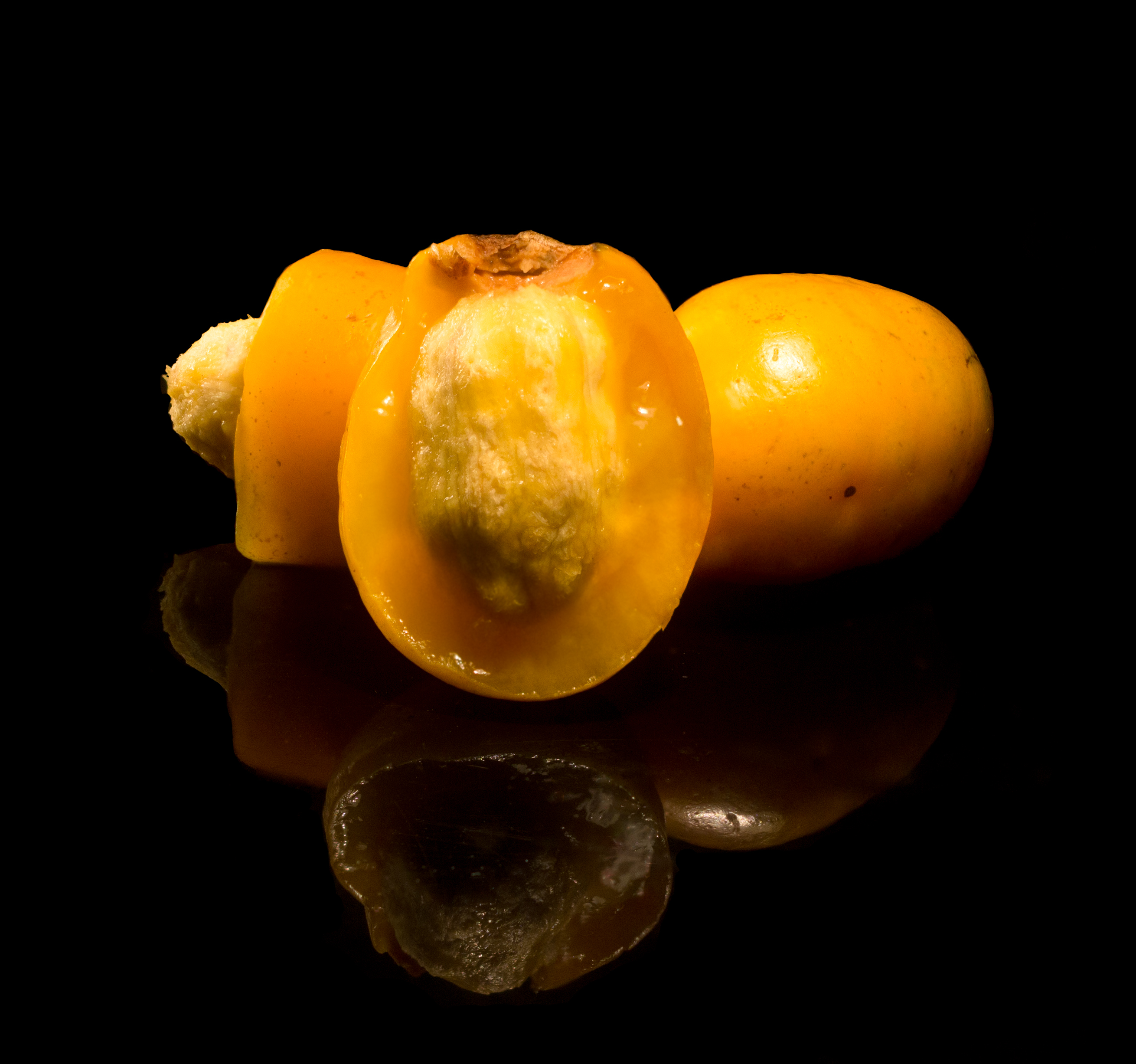 Ciriguela (Spondias purpurea) fruto cortado e inteiro.